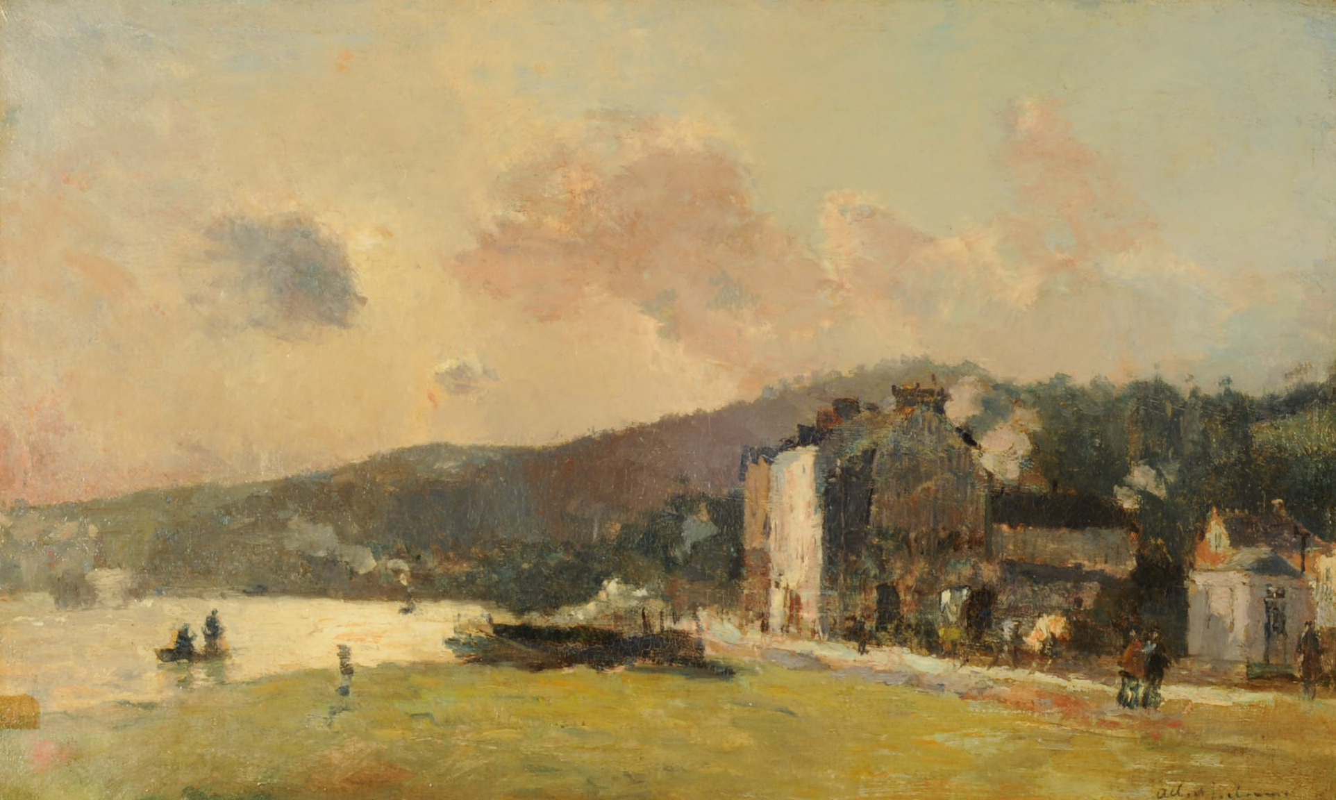 Albert Lebourg, Le Seine à Croisset, près de Rouen (El Sena en Croisset, cerca de Rouen). Siglo XIX. 46,5 x 76 cm, con marco: 74,5 x 104,5 cm, óleo sobre tela. Inv. 2709.